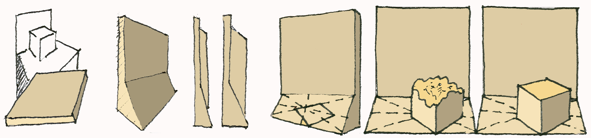 "Teoría del Volumen" liburuaren 169. orrialdetik aurrera azaltzen da nola eraiki erlieve bat.